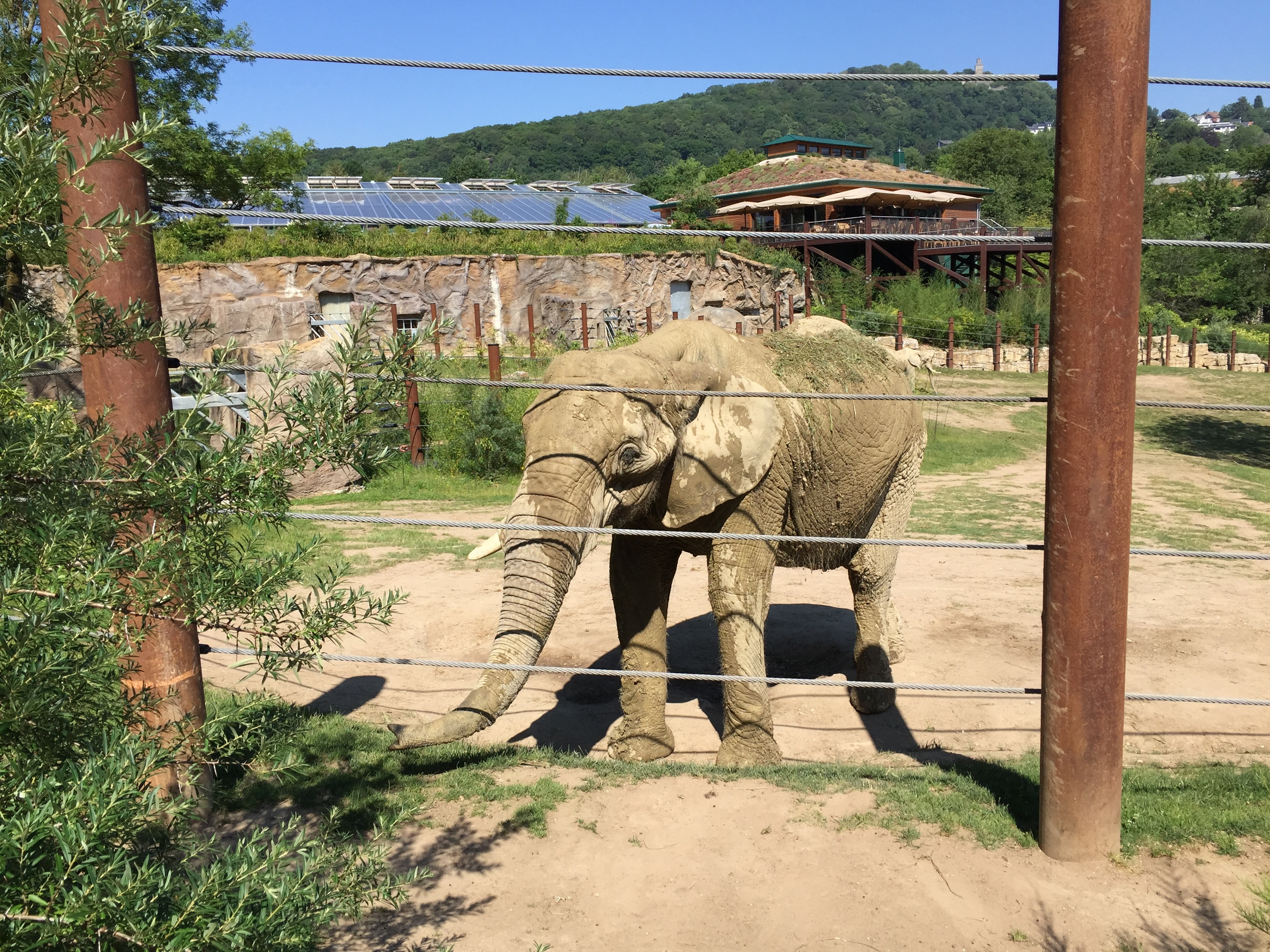 Opel Zoo